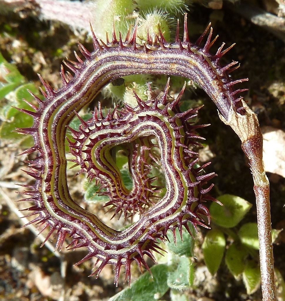 Scorpiurus muricatus s.l. (Granillo de oveja) : Fruto - Cabezo de los Ojales/de las Fuentes, Albatera (Alicante, España).